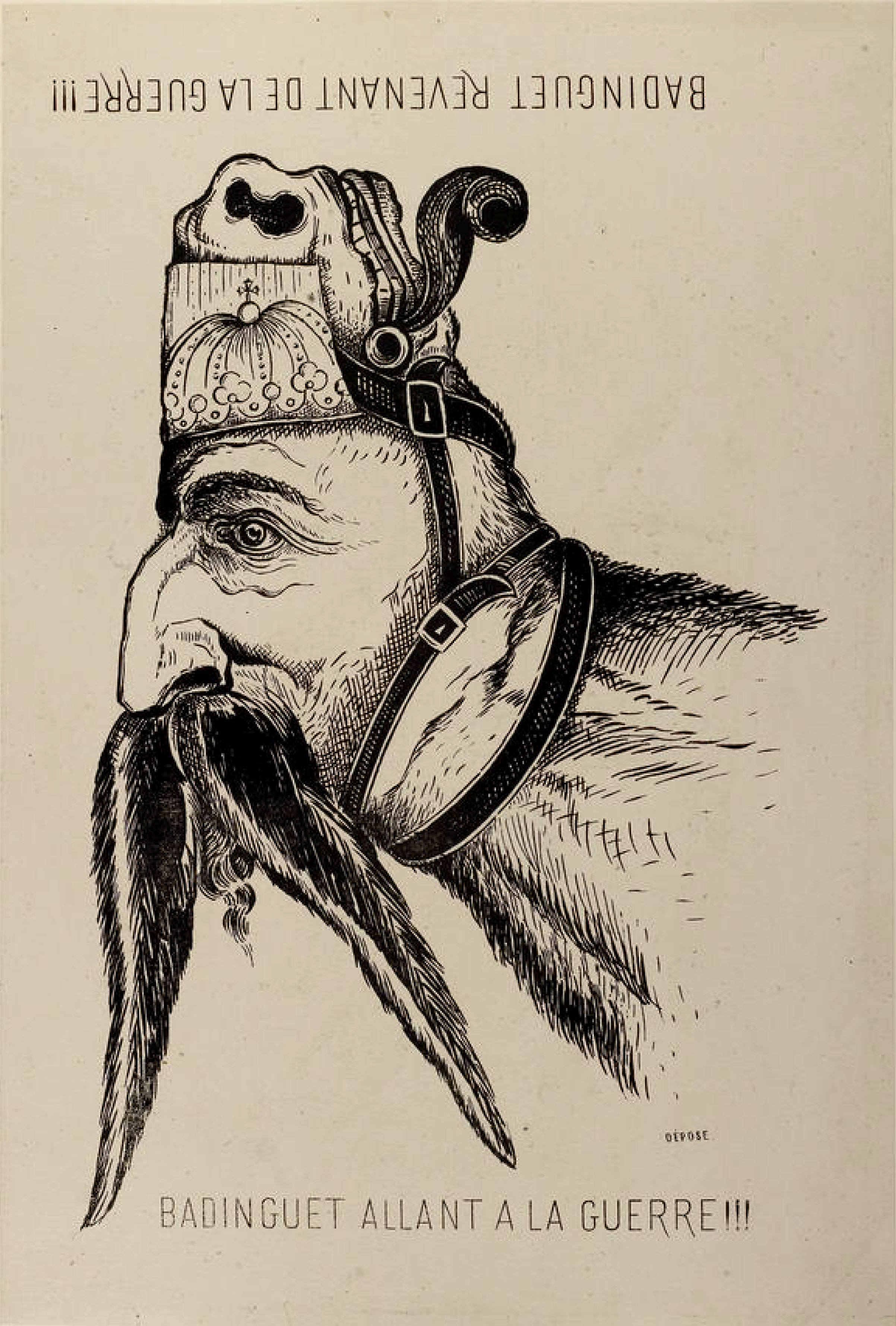 Badinguet allant en guerre/Badinguet revenant de la guerre. Collection de caricatures et de charges pour servir à l'histoire de la guerre et de la révolution de 1870-1871 (Vol. 1, p.49)